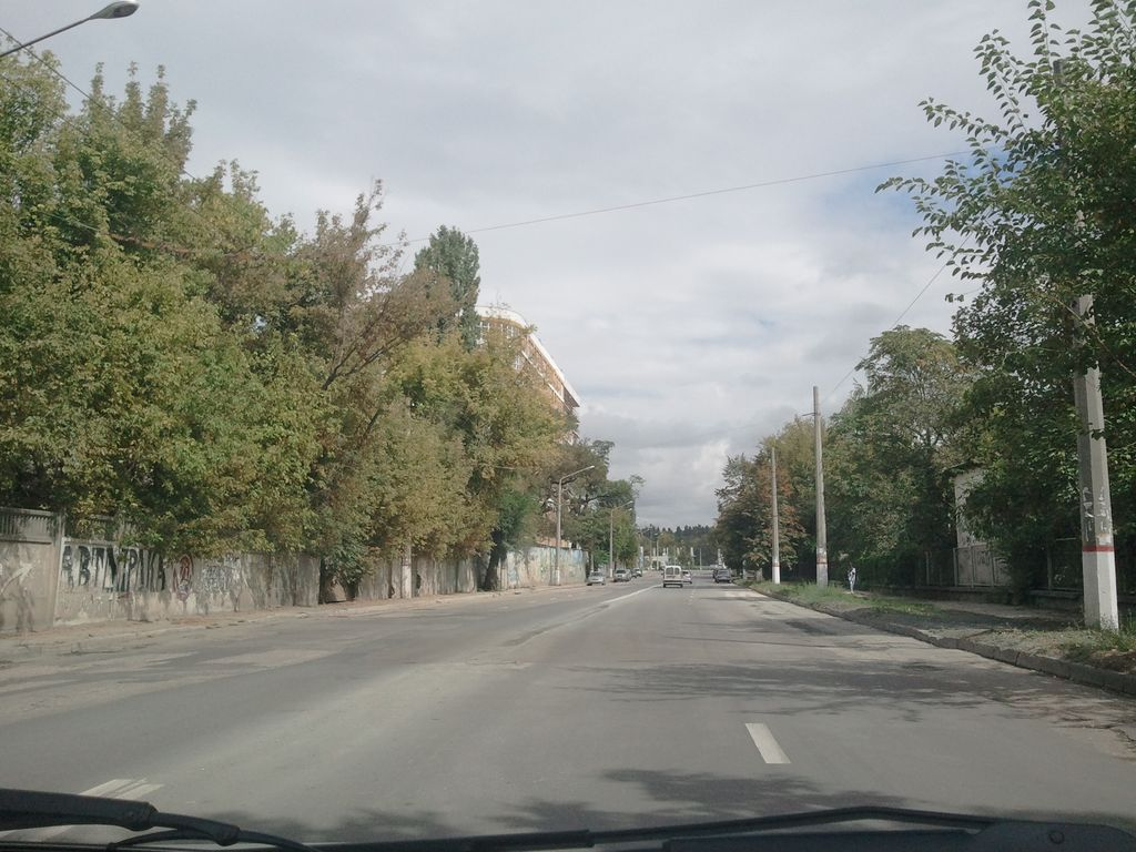 Слева за забором территория бывшей губернской земской больницы. Часть которой занимает ГБУЗ РК «Крымская республиканская клиническая психиатрическая больница № 1». Вдали новостройка на территории больницы и набережной Салгира.